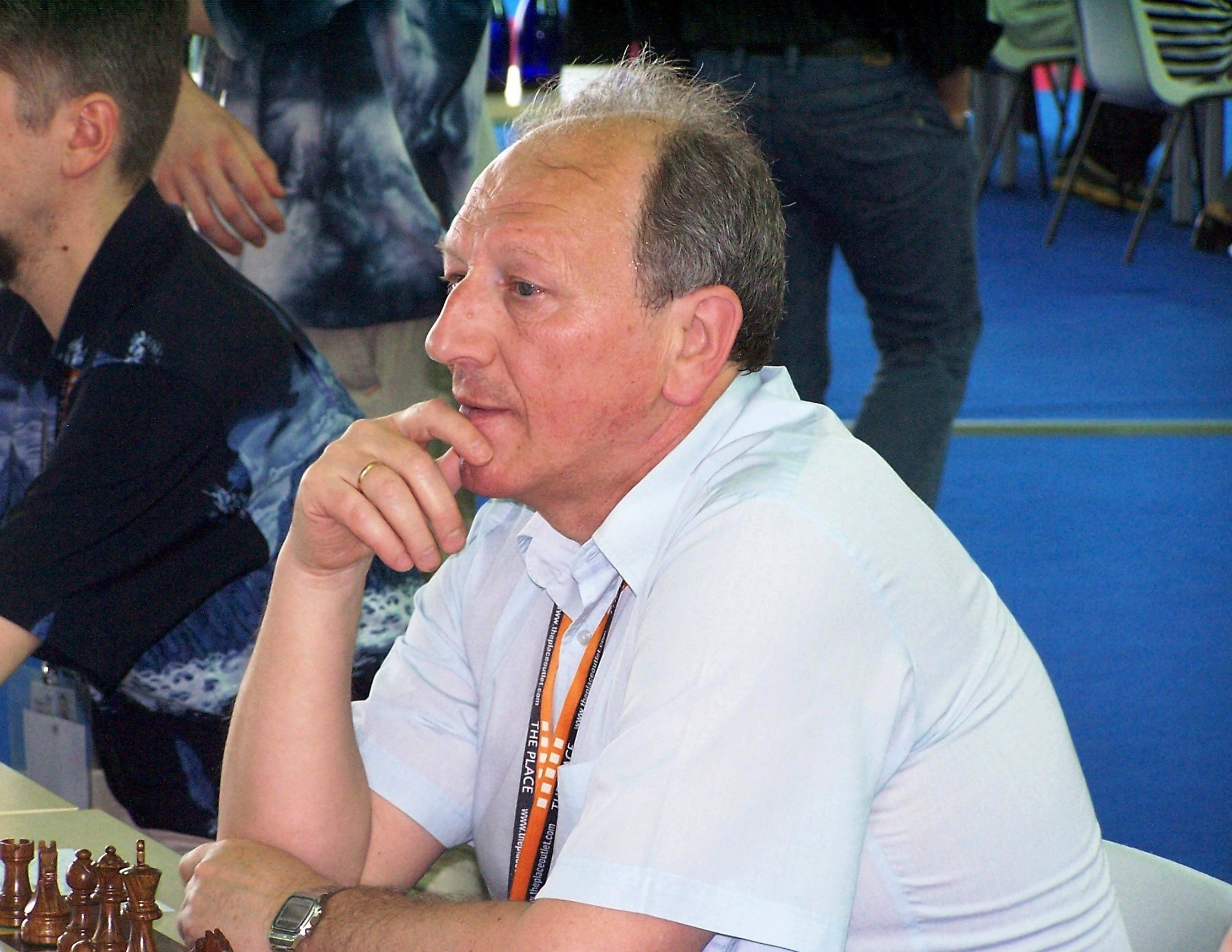 foto delm Grande Maestro Evgeny Sveshnikov alle olimpiadi di scacchi di Torino 2006